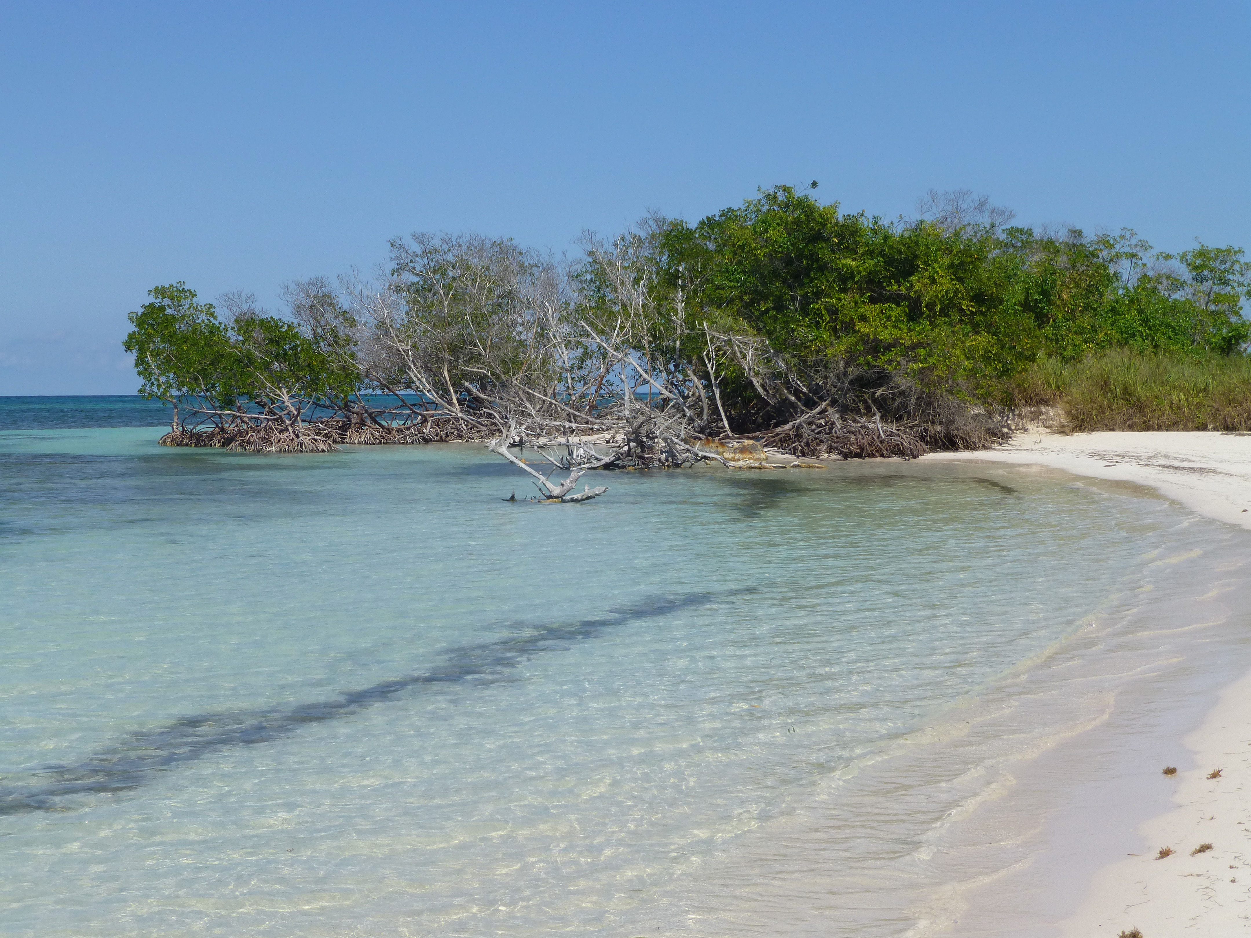 Mangrove sur l'île de Cayo Jutías (Cuba)